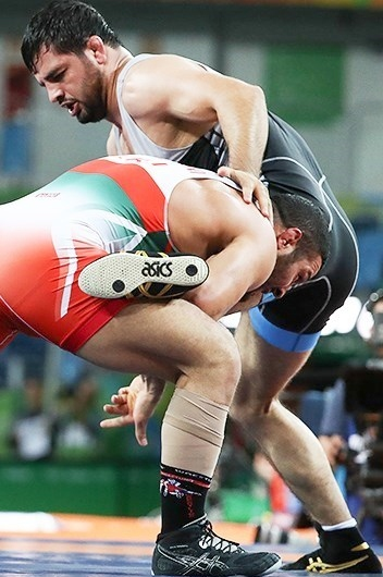 2016 Summer Olympics, Men's Freestyle Wrestling 97 kg